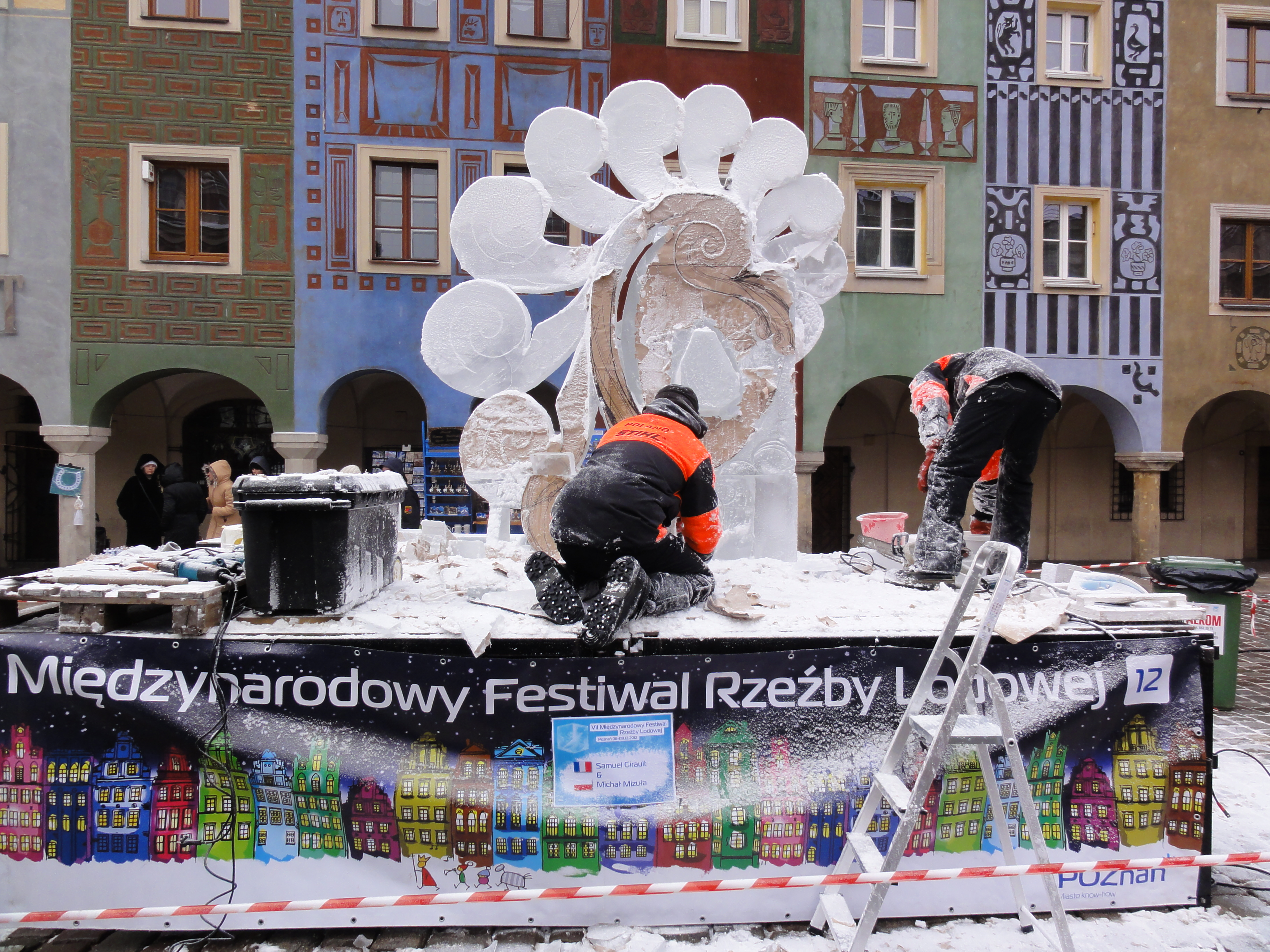 Międzynarodowy festiwal rzeźby lodowej w Poznaniu. 2012 rok.